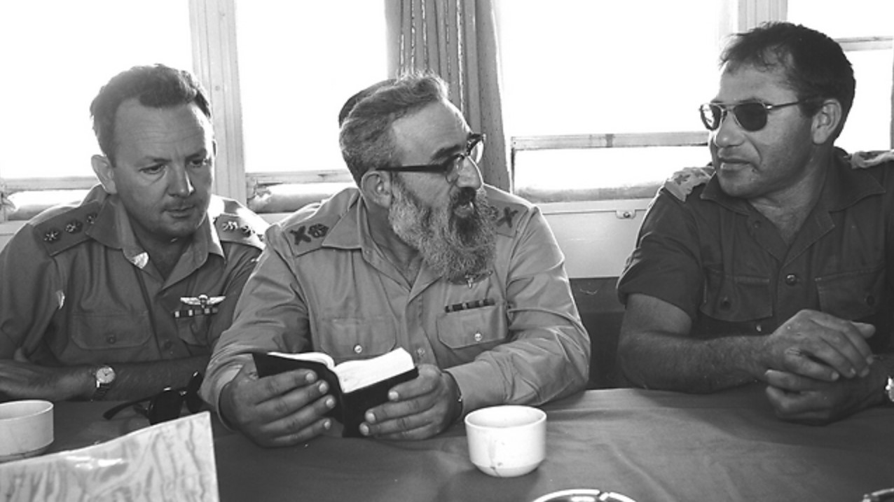 מימין לשמאל: מפקד חטיבה 7, אל"מ שמואל גונן, הרב הצבאי הראשי האלוף שלמה גורן ואל"מ רם רון, לפני מלחמת ששת הימים